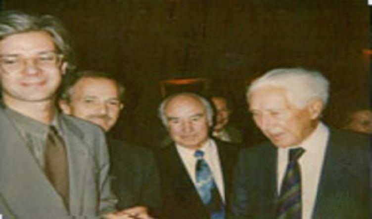 Jaboco Siruela, Antonio Escohotado, Albert Hofmann, Ernst Jünger (de izquierda a derecha, 1992)